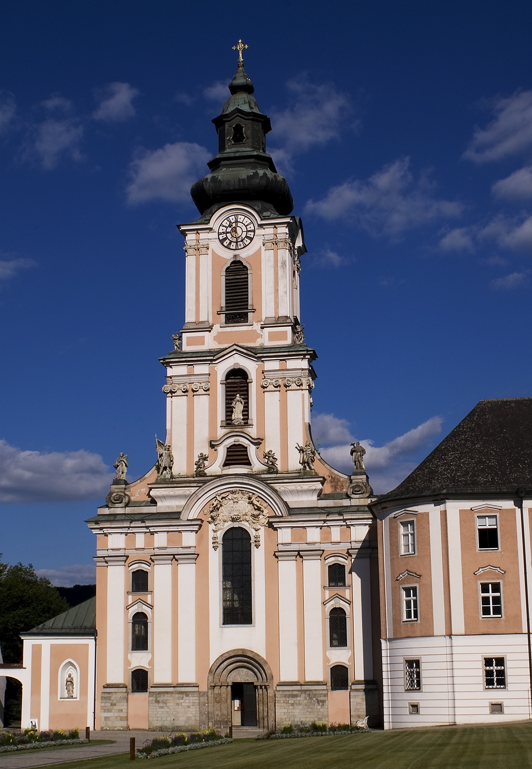 Fassade der Stift Wilhering